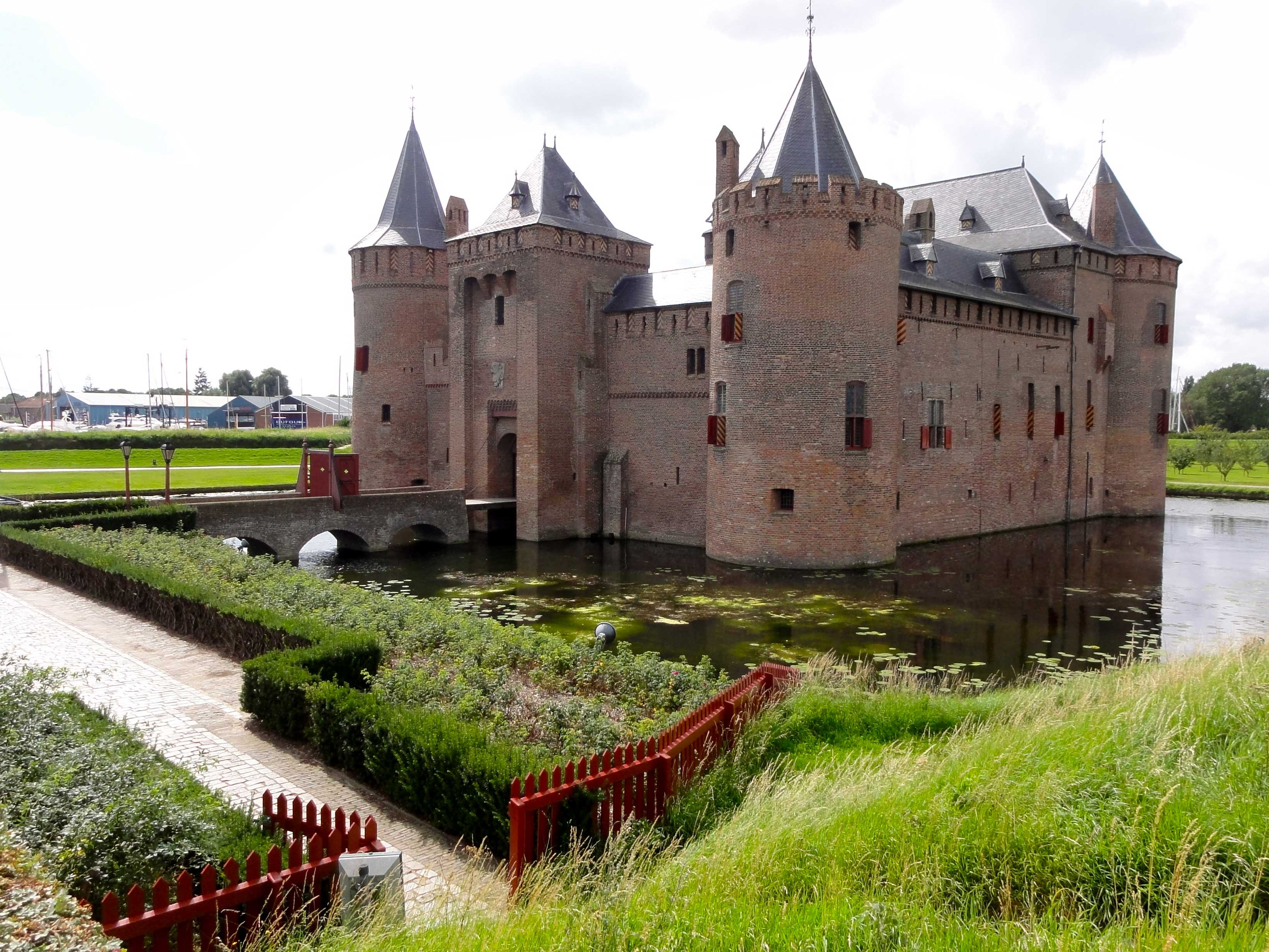 Muiderslot (noordoostzijde)